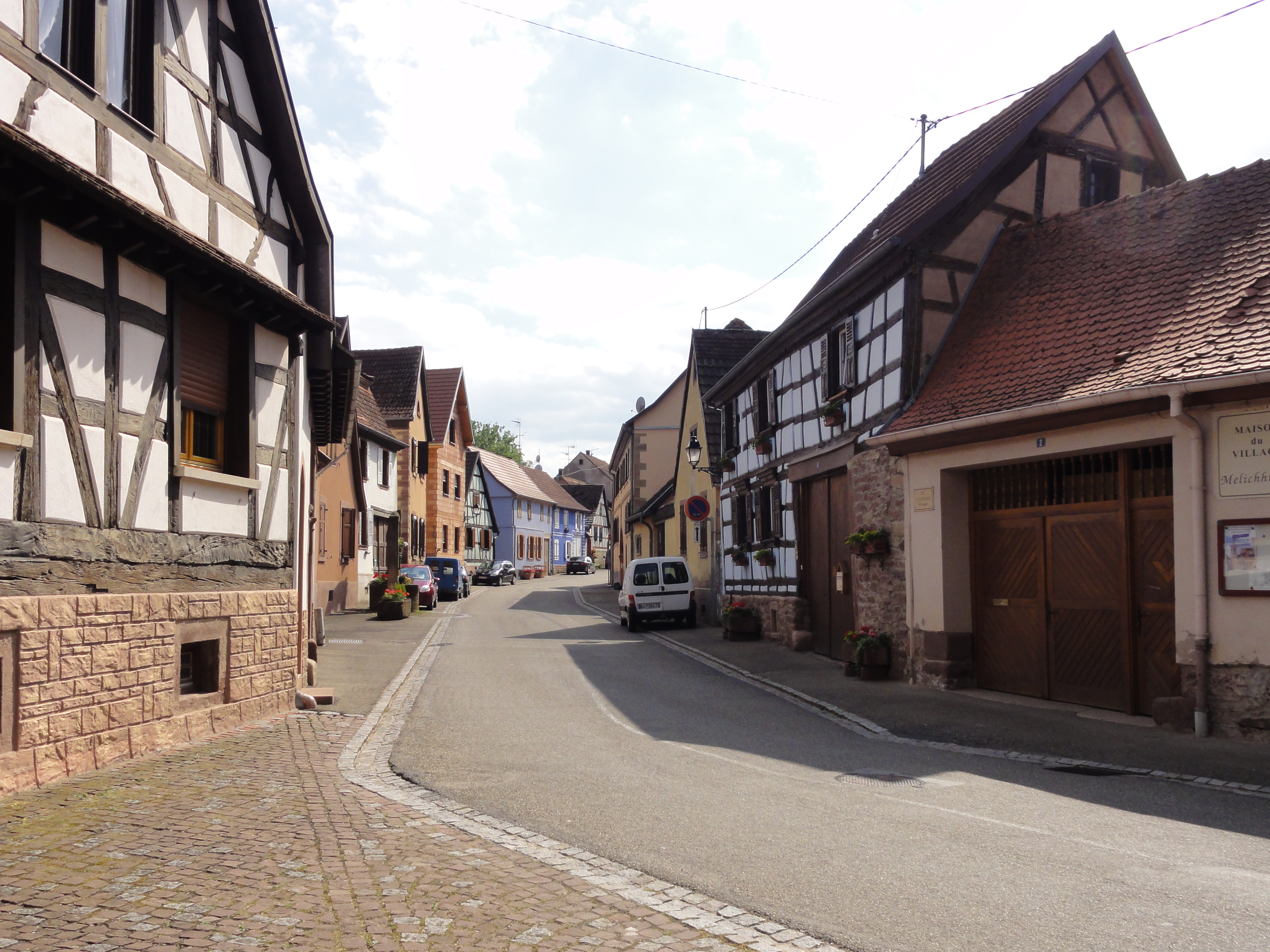 Alsace, Bas-Rhin, Flexbourg, Rue des Seigneurs.